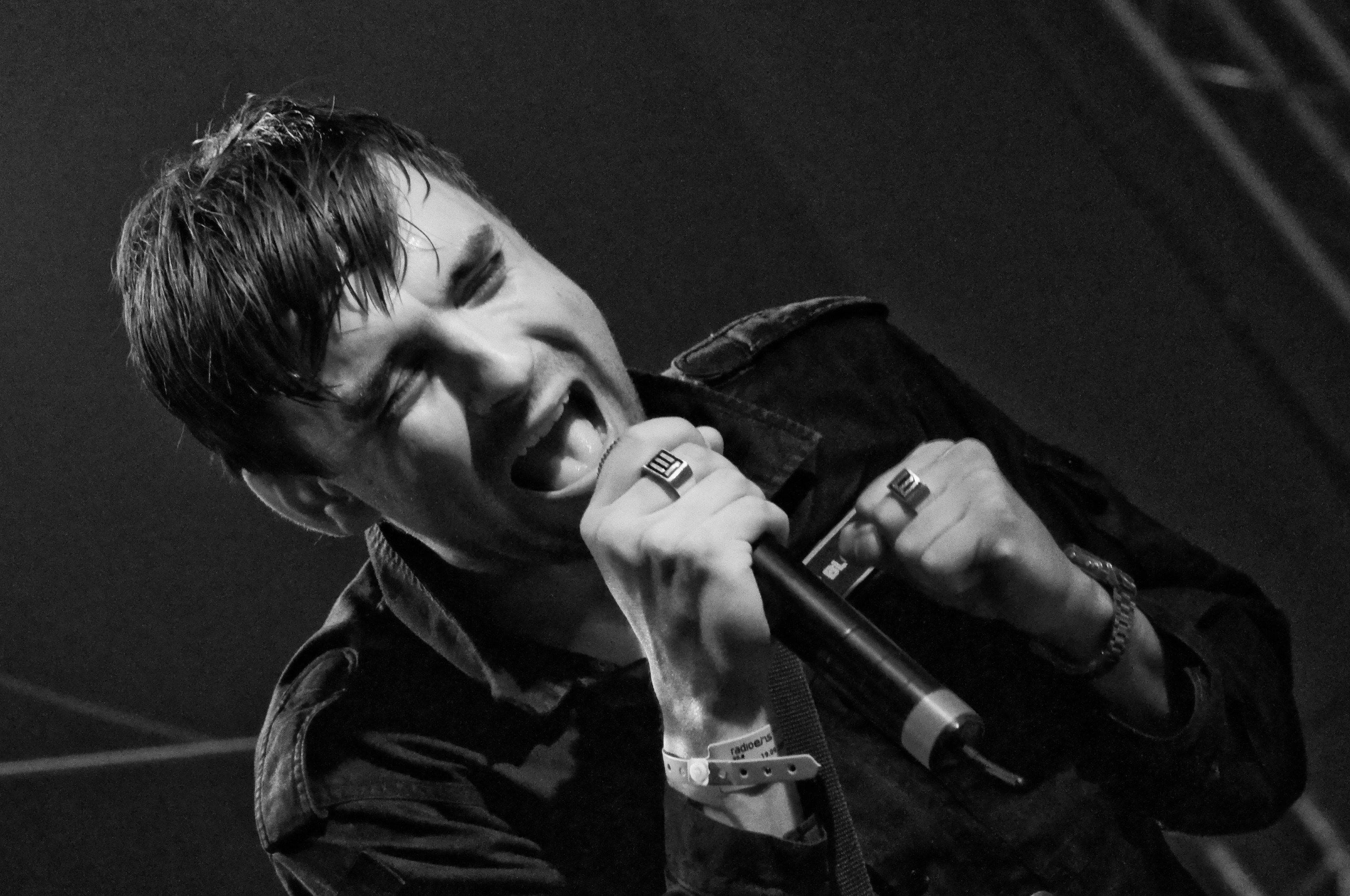 Musikeren Simon Kvamm under en Nephewkoncert på Popkommfestivalen, 8. oktober 2008.